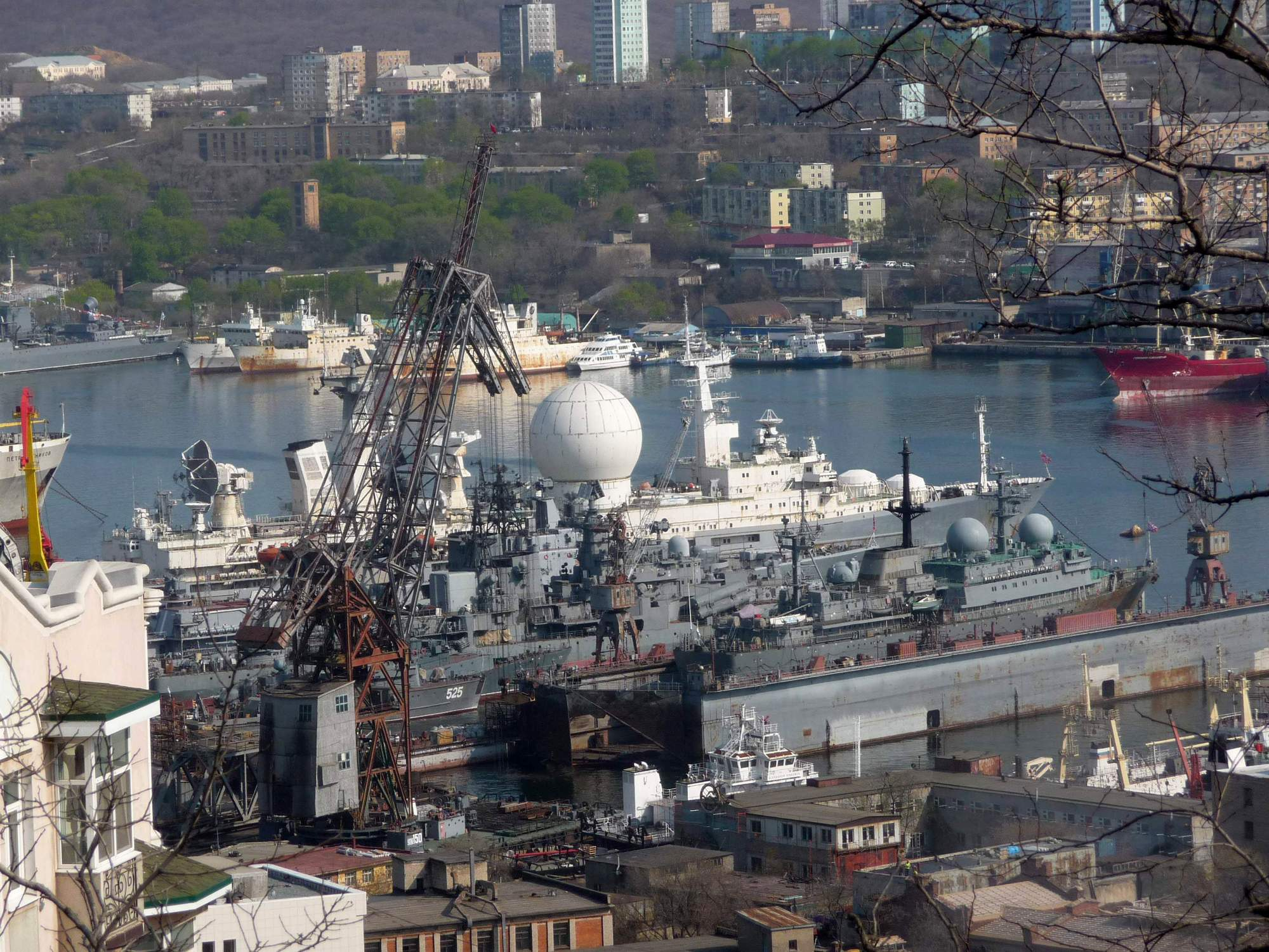 Корабли и суда в ремонте на «Дальзаводе», 2012-05-11